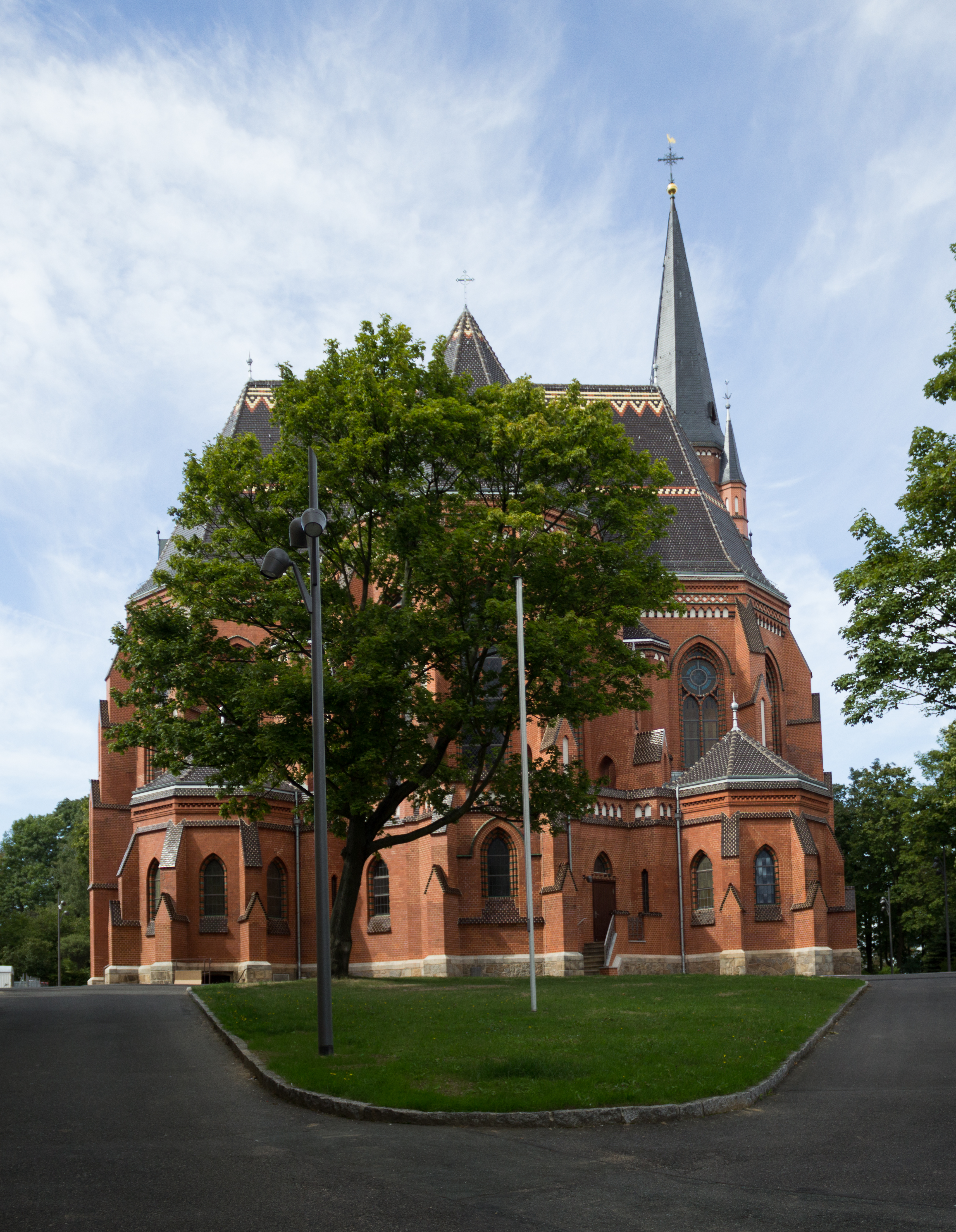 St. Jakobus Görlitz